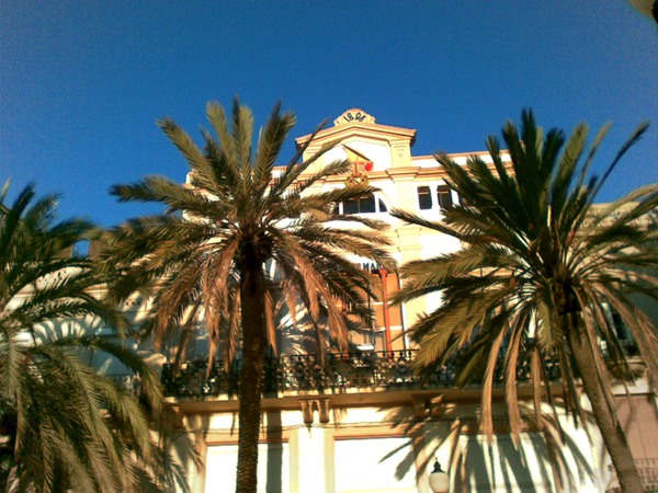 Centre Cor de marina, a la Rambla de Badalona (Centre)